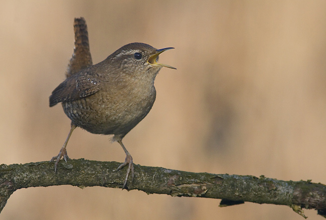 Troglodytes troglodytes